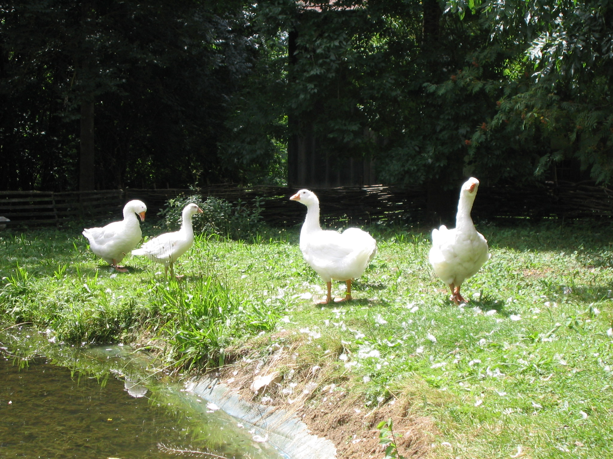 Pommerngänse im Freilichtmuseum Neuhausen ob Eck